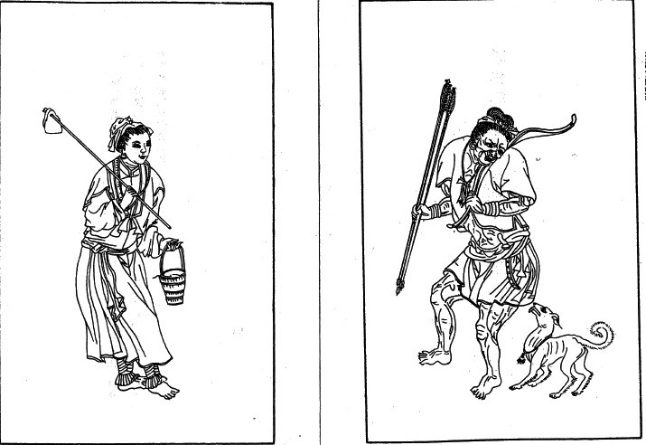 Papora